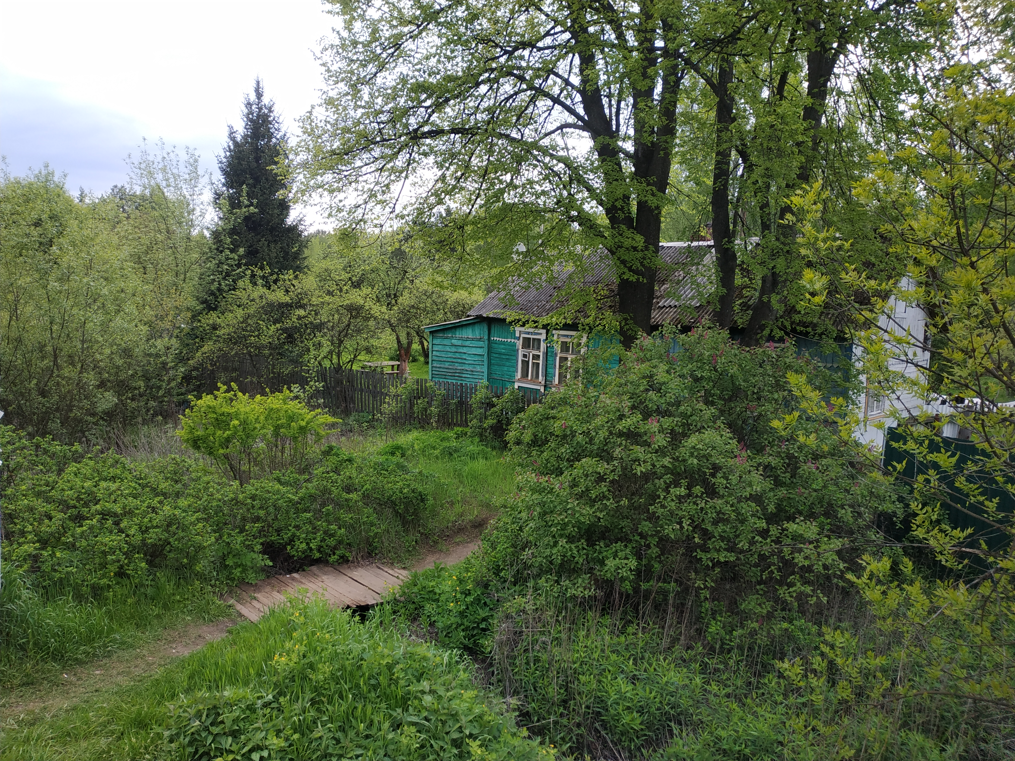 железнодорожный дом у платформы 49 км Казанского направления